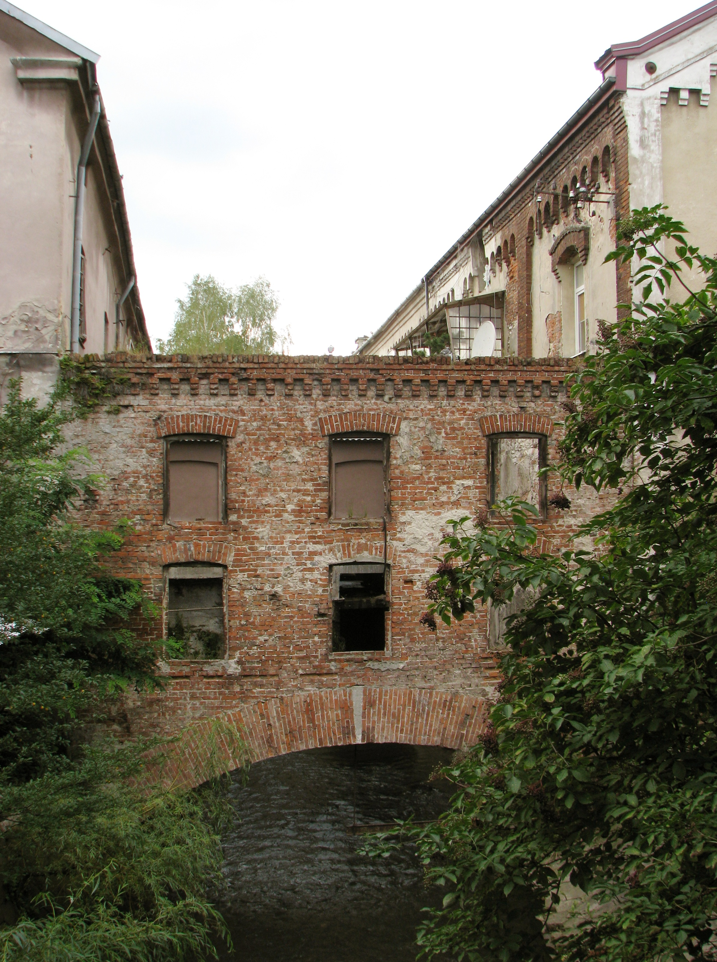 Kanał młyński i tyły zabudowań dawnego młyna wodnego, później elektrycznego, przy ul. Parkowej w Staszowie, woj. świętokrzyskie. Stan na 2012 r. - młyn nieczynny.